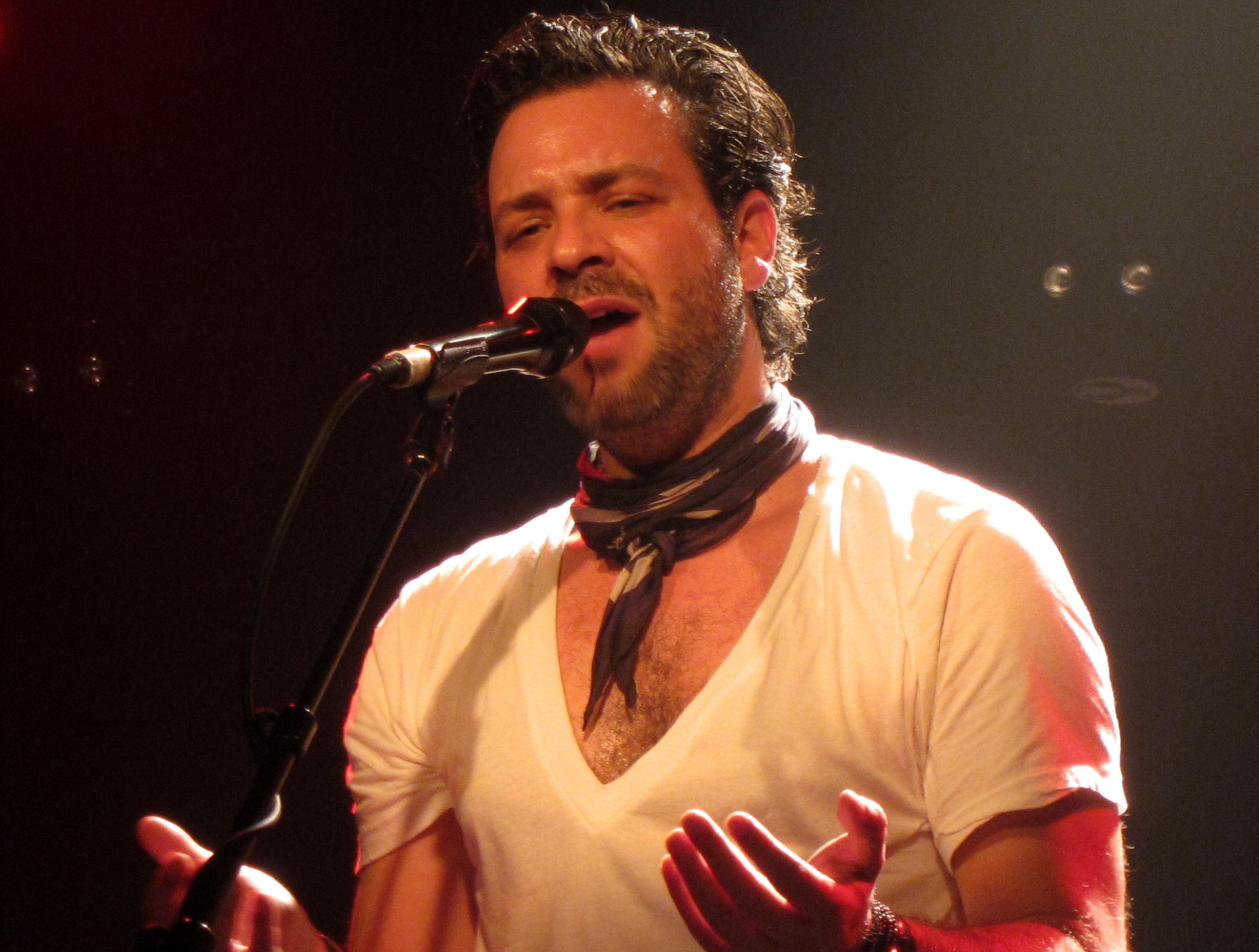 Frontman van de Low Millions